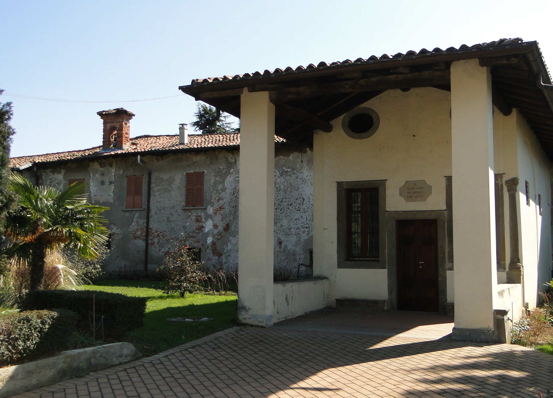 Chiesa San Martino Vecchio, Torre Boldone (BG), Italia